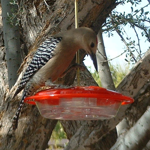 Melanerpes uropygialis Taken at Arizona-Sonora Desert Museum, Tucson, Arizona, USA